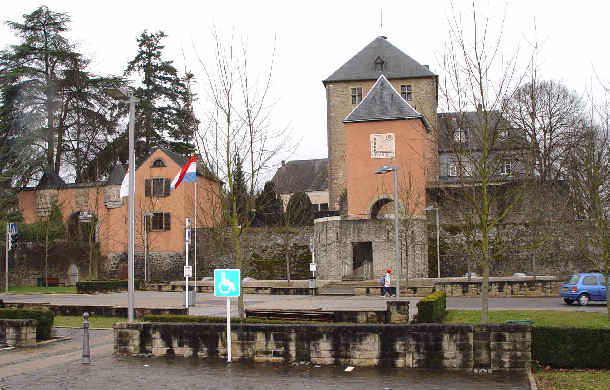 Le château de Mersch (Luxembourg)